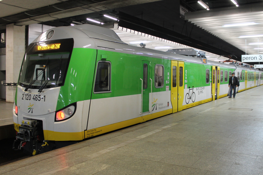 Elektryczny zespół trakcyjny EN57AL-1667 stoi na przystanku Warszawa Śródmieście.